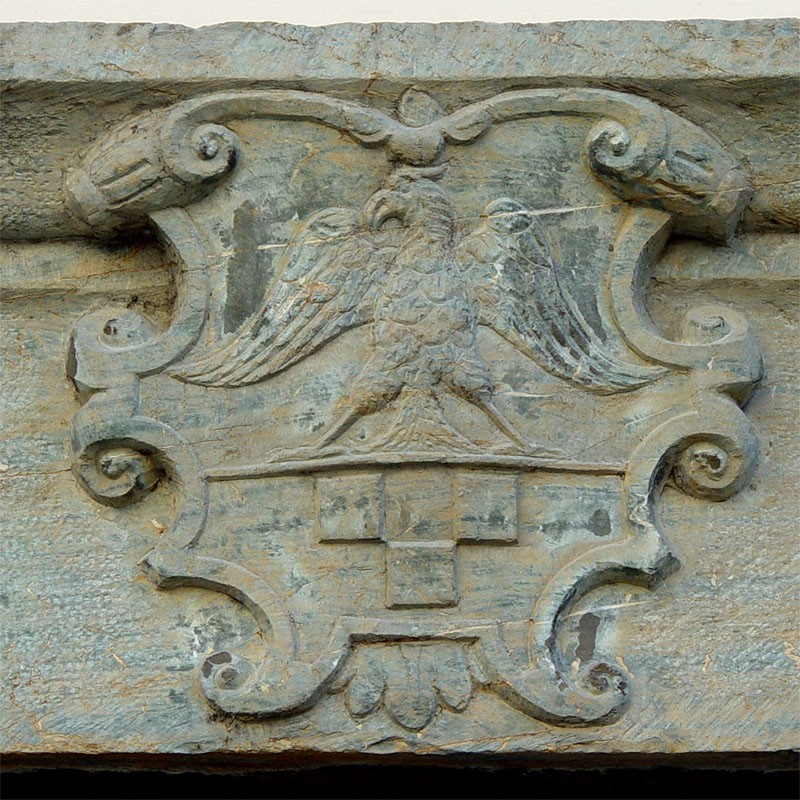 Description Stemma della famiglia Quadrio in pietra verde di Tresivio da un portalino di casa Negri in Piazza Stefano Quadrio a Chiuro, Sondrio - Italy Date February 2, 2006 Photographer Franco Folini